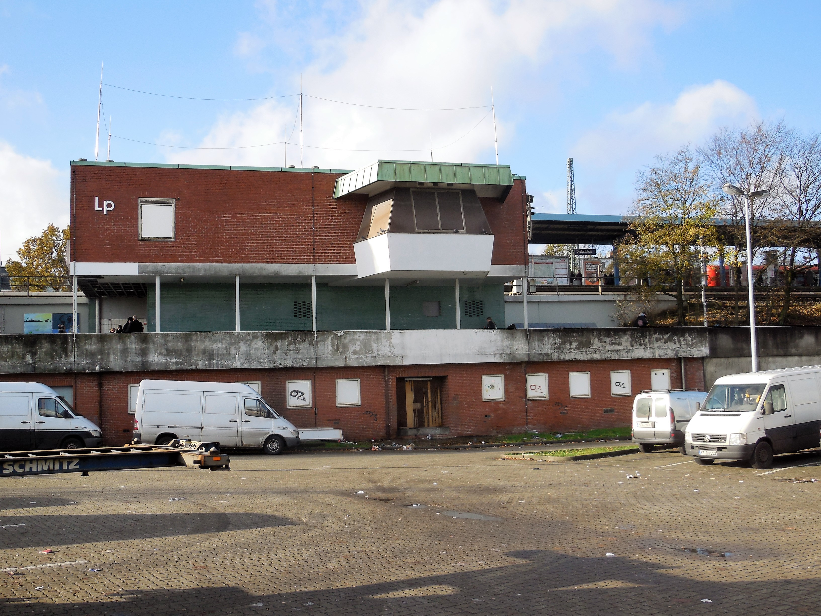 Haltepunkt Hamburg Diebsteich